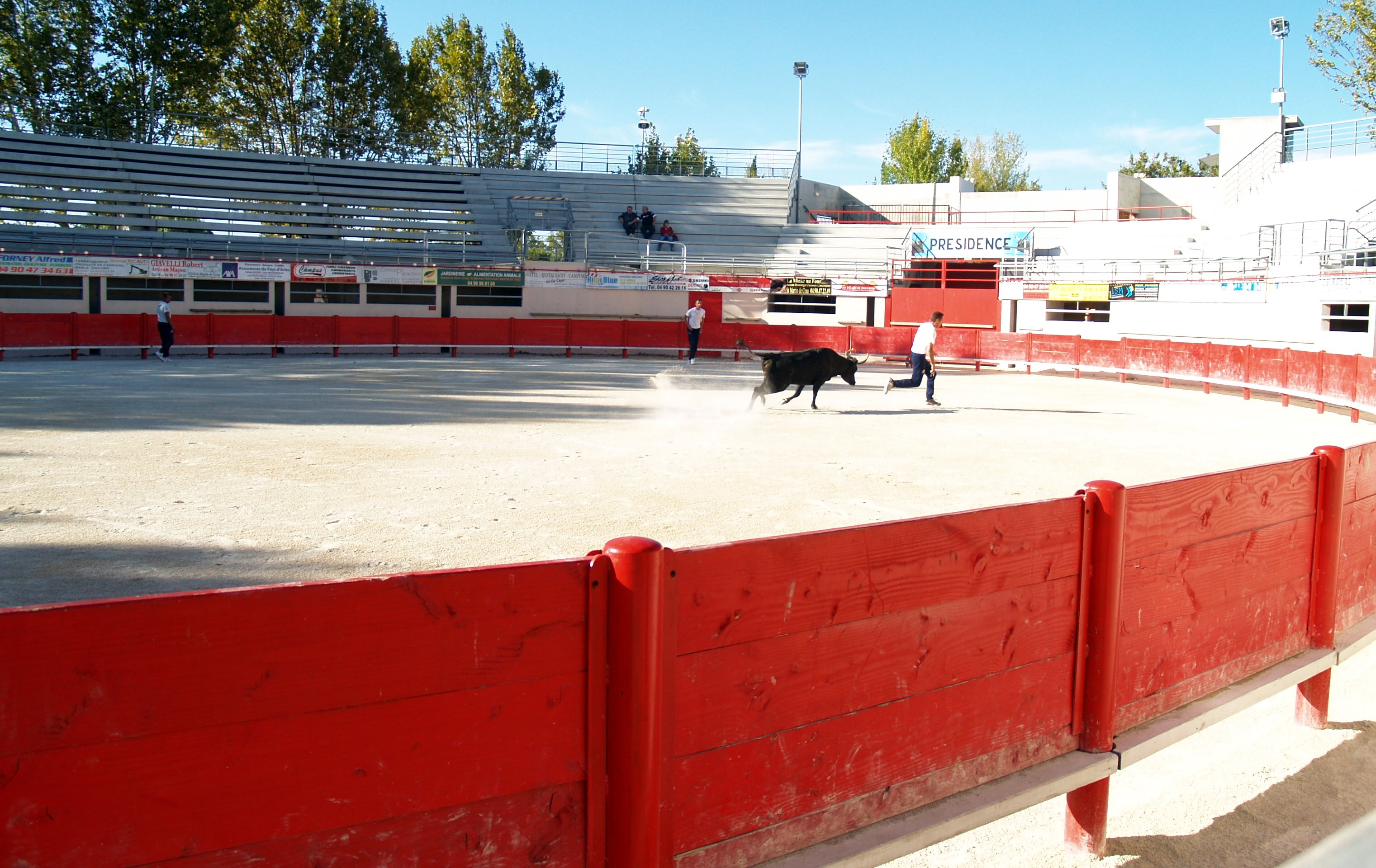 Die Stierkampfarena Arenes Municipales Louis Thiers im französischen Ort Saint-Martin-de-Crau, der Partnerstadt von Markgröningen.